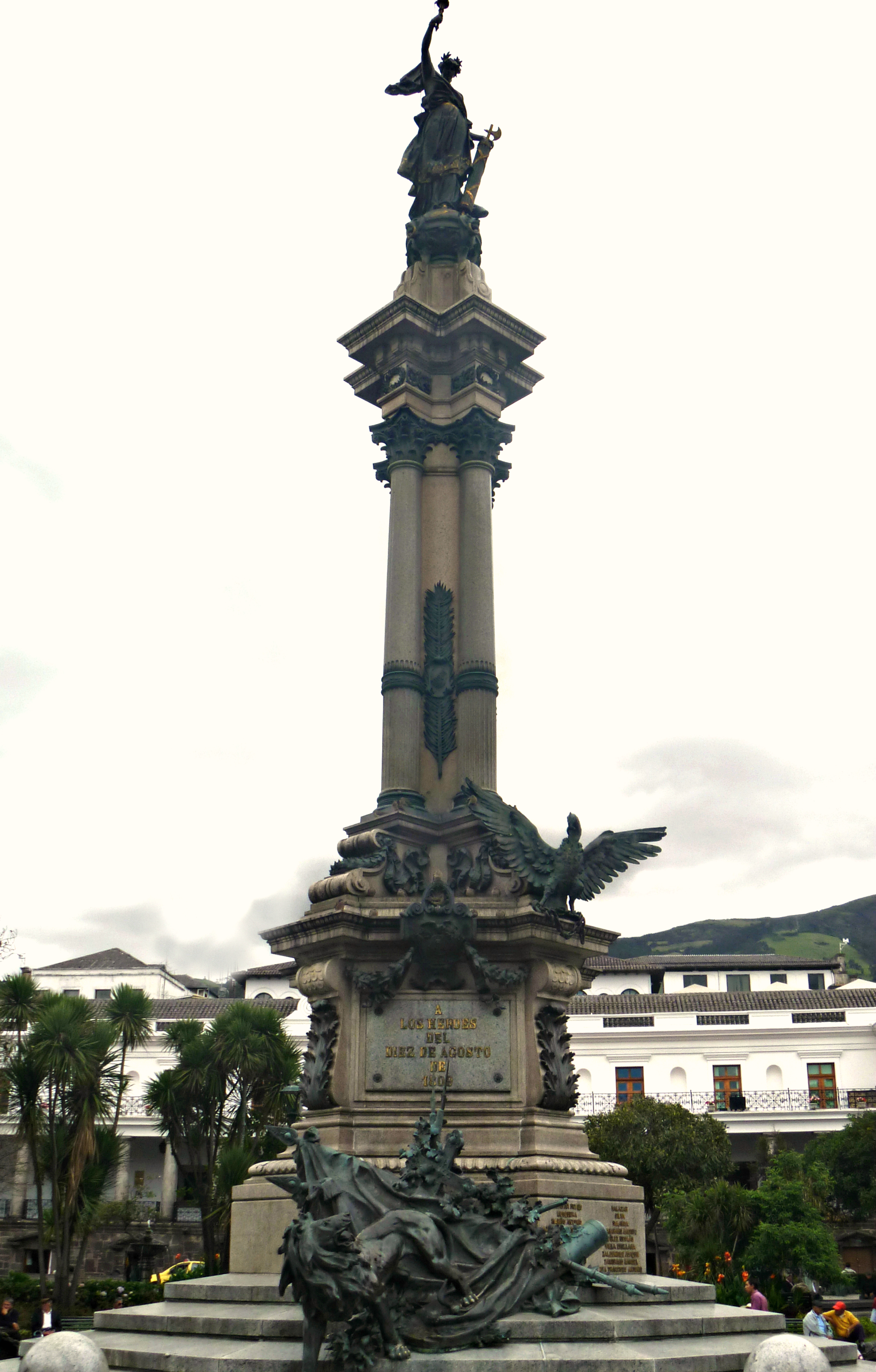 Columnata conmemorativa de la ciudad de Quito, ubicada en la llamada Plaza Grande o Plaza de la Independencia, del Centro Histórico de la urbe. Fue levantada en memoria de los próceres independentistas de la Revolución Quiteña del 10 de agosto de 1809, asesinados en las celdas del Real Cuartel por soldados españoles. Obra de los arquitectos Francisco y Lorenzo Durini, sobre una idea previa de Juan Bautista Minghetti. Inaugurada el 10 de agosto de 1909, durante la presidencia del Gral. Eloy Alfaro Delgado.